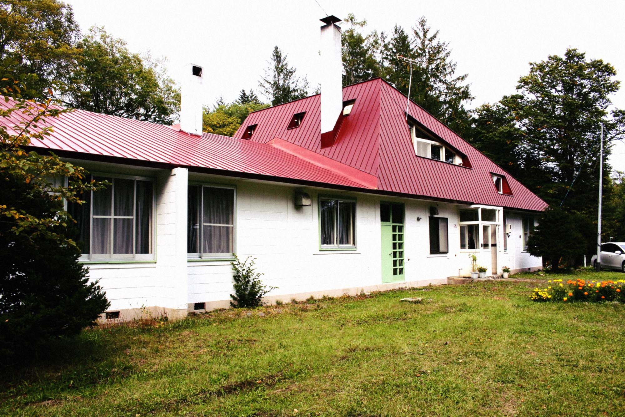 北海道家庭学校桂林寮（現・北海道家庭学校博物館）、田上義也設計 ※北海道家庭学校の許可を得て撮影